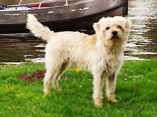 Un smous des Pays-Bas près d'un canal à Amsterdam.